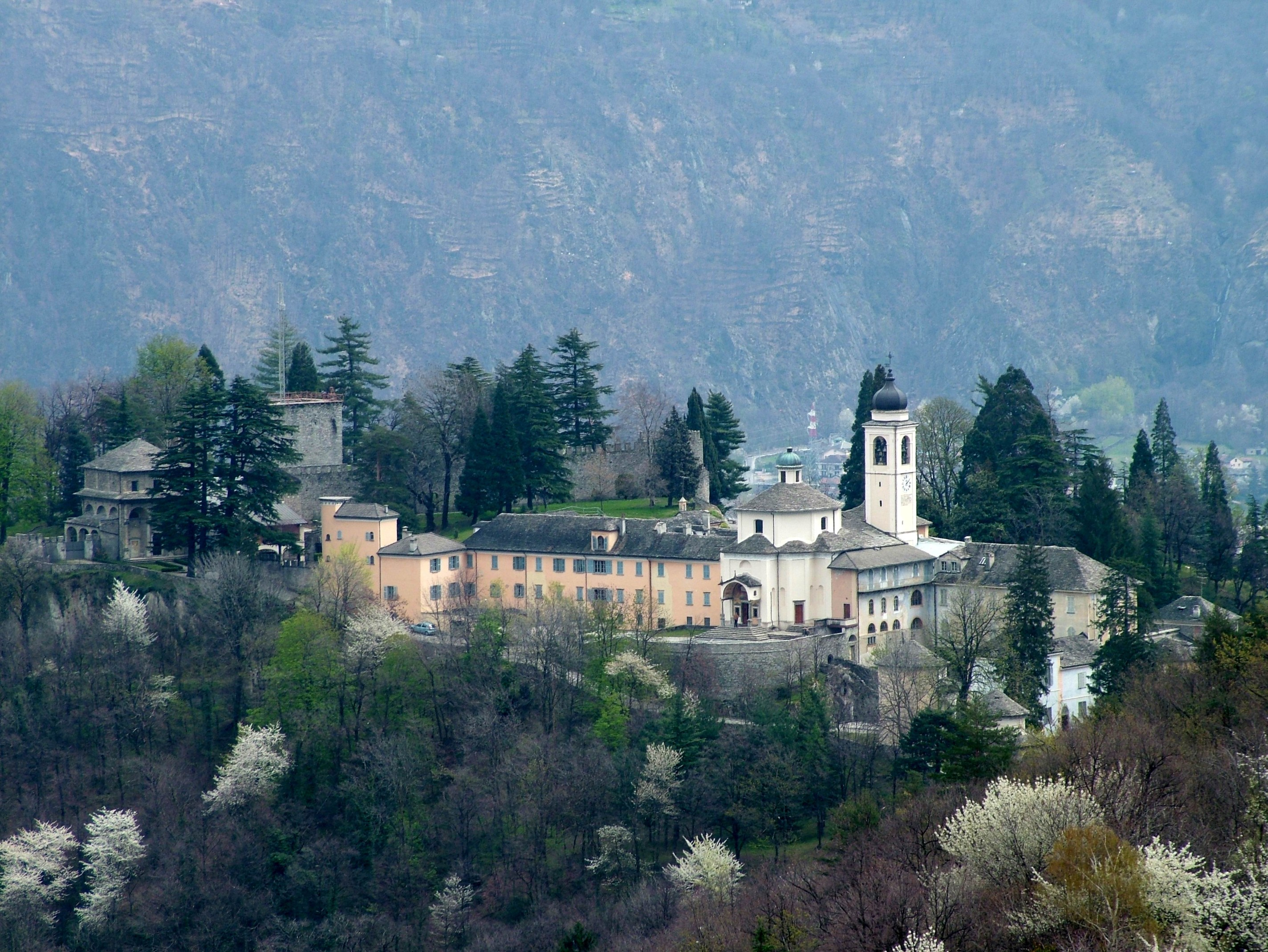 Domodossola, Italien, Sacro Monte vom Ortsteil Motto aus.